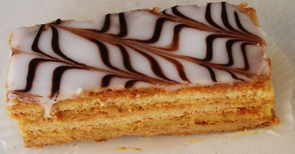 Un mille-feuille français